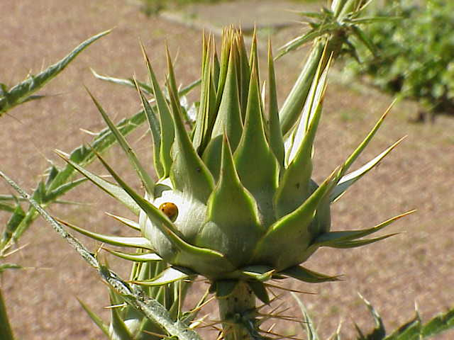 Species: Cynara cardunculus Family: Compositae Image No. 1